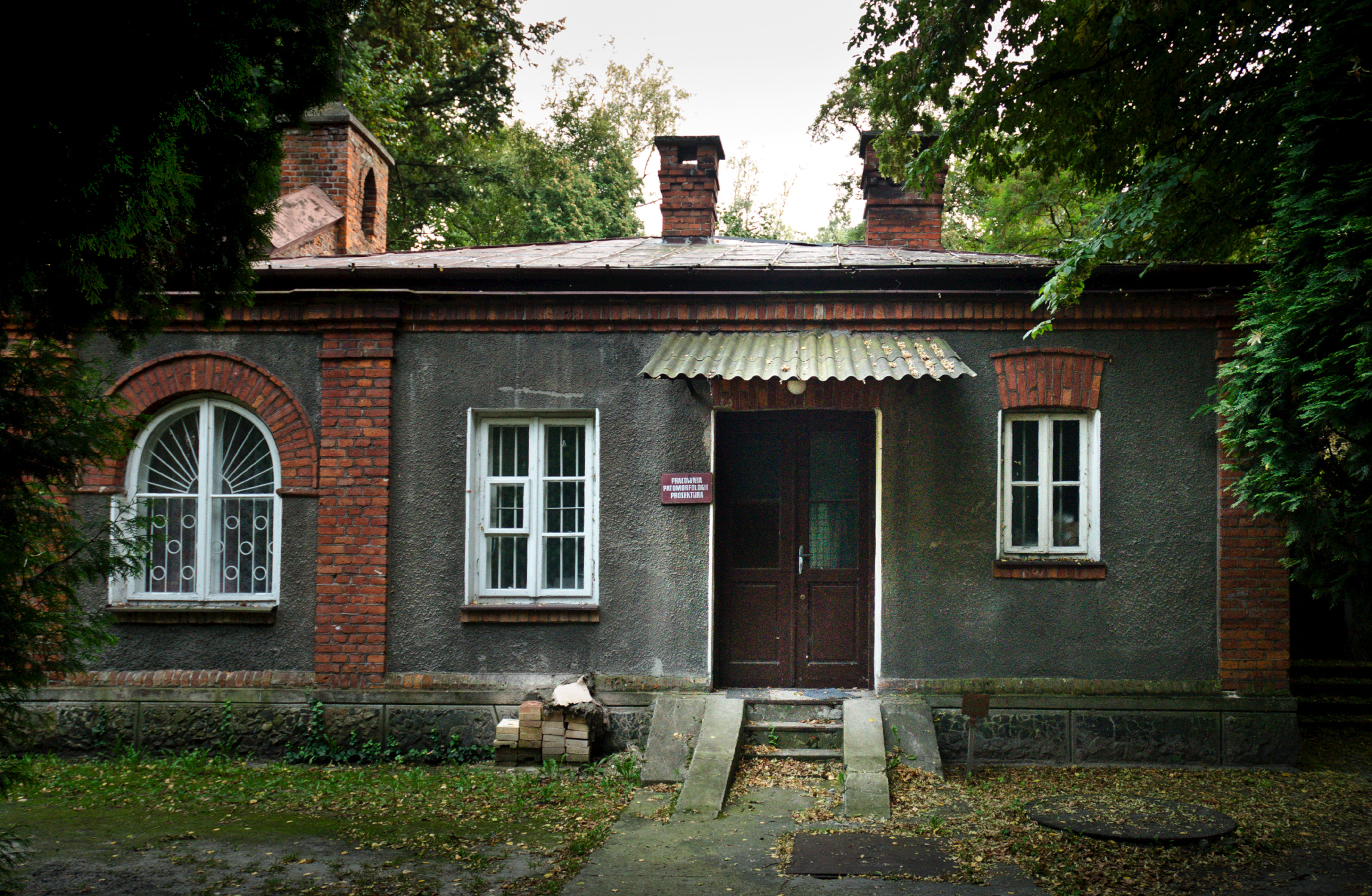 Pruszków - Pracownia Patomorfologii Prosektura